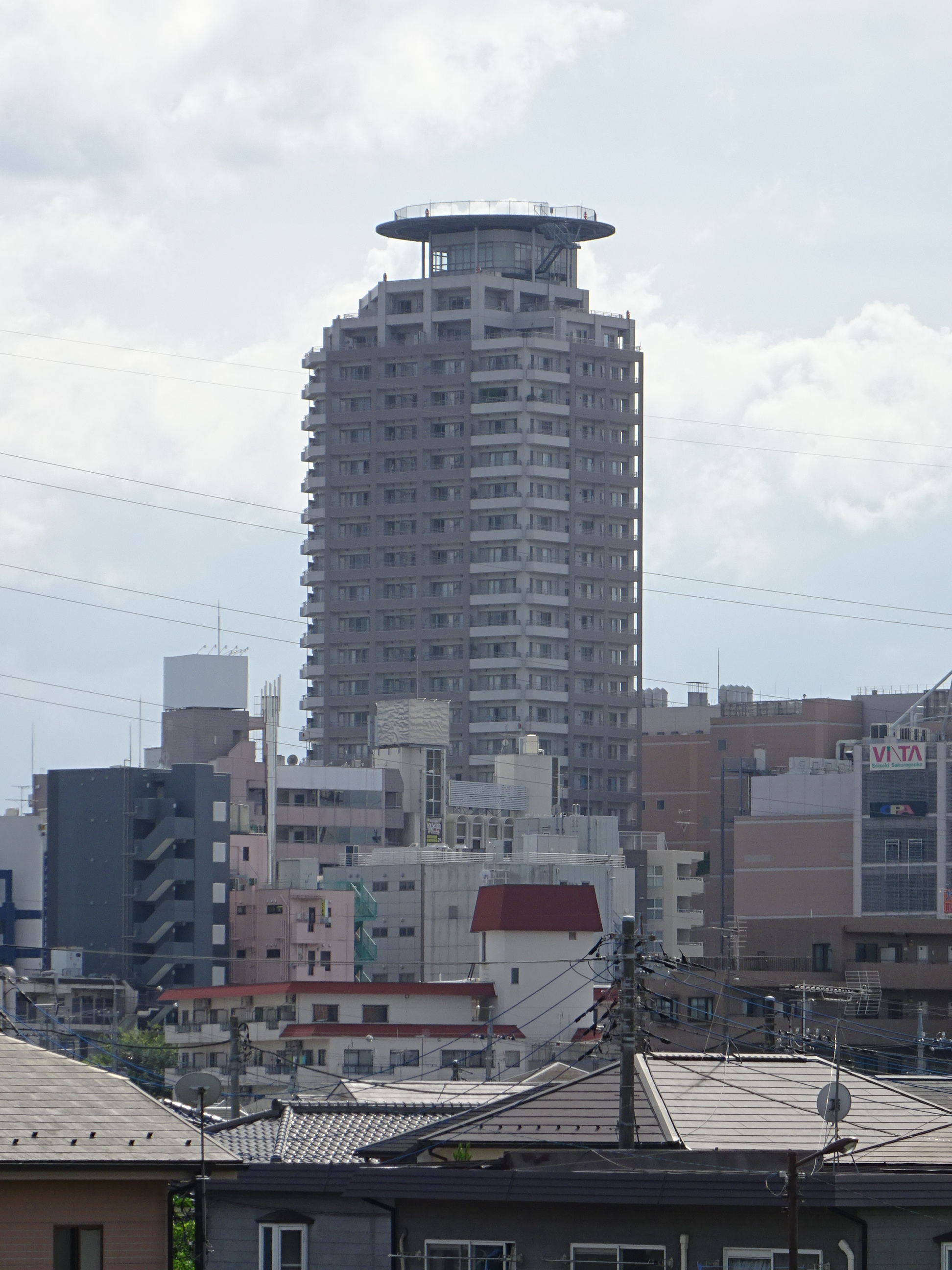 多摩市のタワーマンション「聖蹟桜ヶ丘ビュータワー」の写真。聖蹟桜ヶ丘駅前の再開発で、このタワーマンションと大型商業施設が建設された。2015年7月17日撮影。